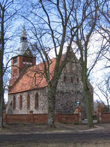 Kościół pw. Matki Boskiej Szkaplerznej w Wołczkowie